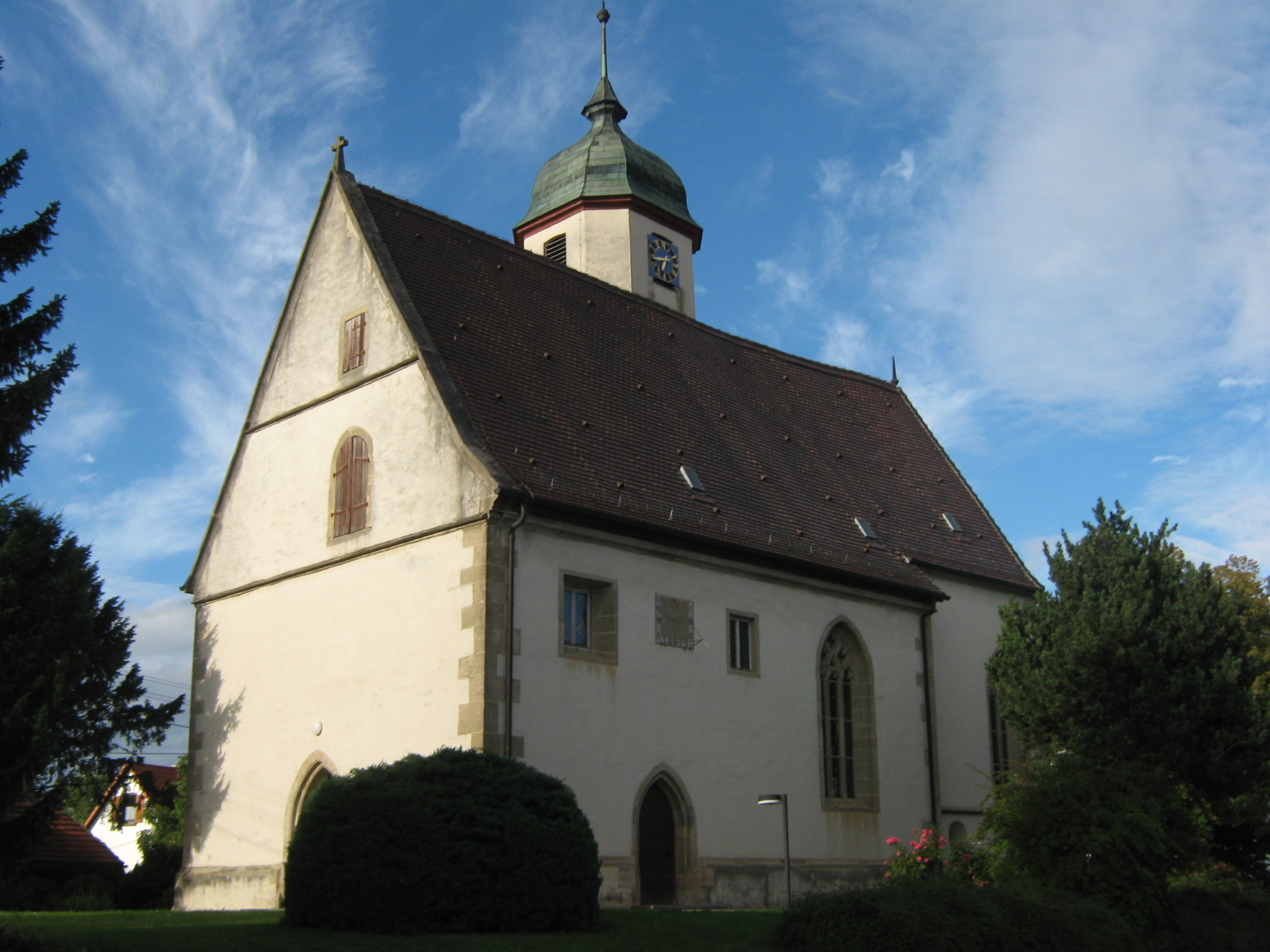 Evangelische Peterskirche an der Hauptstraße im Ortsteil Remmingsheim bei Neustetten im Landkreis Tübingen